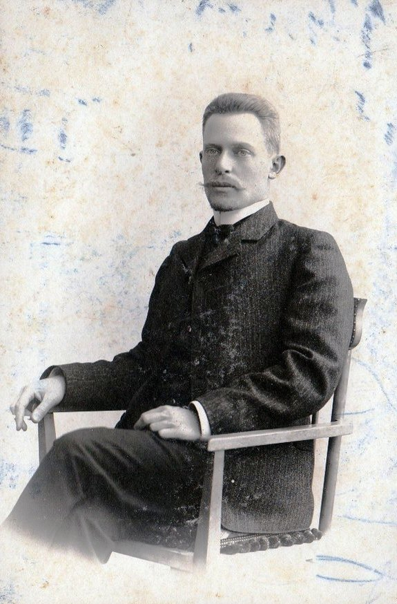 Степан Иванович Клименков, русский врач, профессор